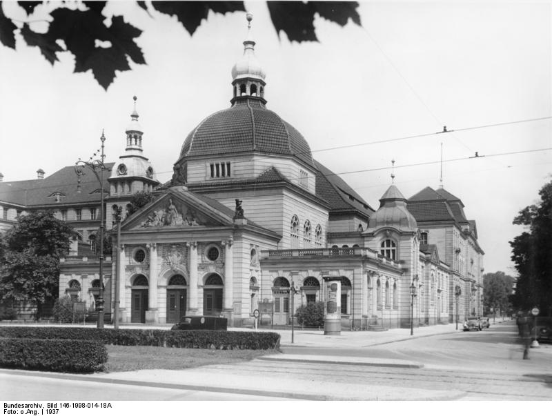 Berlin; Hochschule für Musik, Hardenbergstrasse 1937